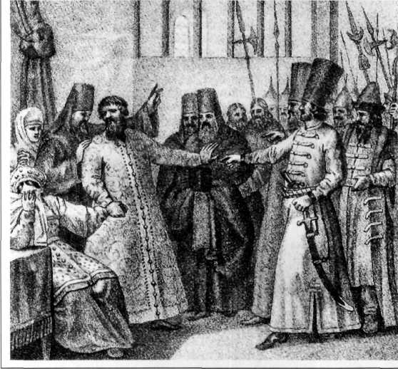 Гравюра П. Иванова (XIX век): Насильственное пострижение Василия Шуйского (1610 г.)